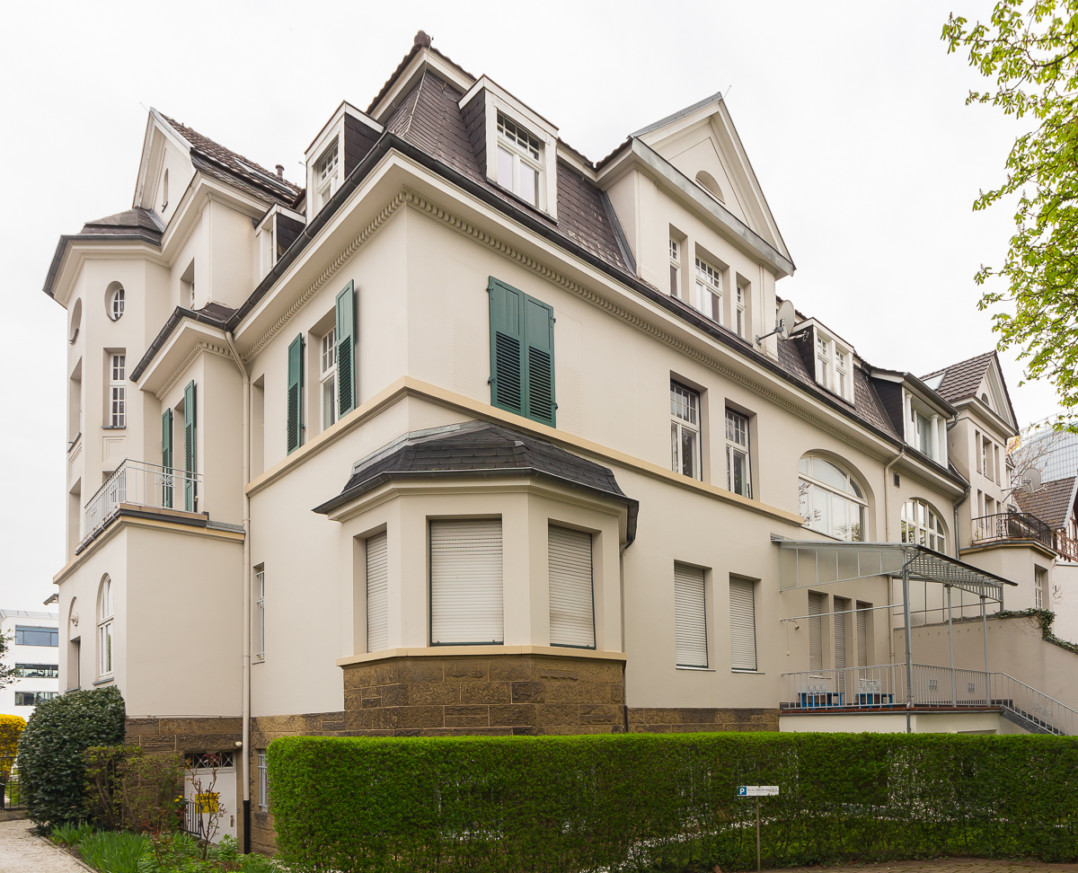 Villa, Heussallee 40, Bonn: Rückfassade